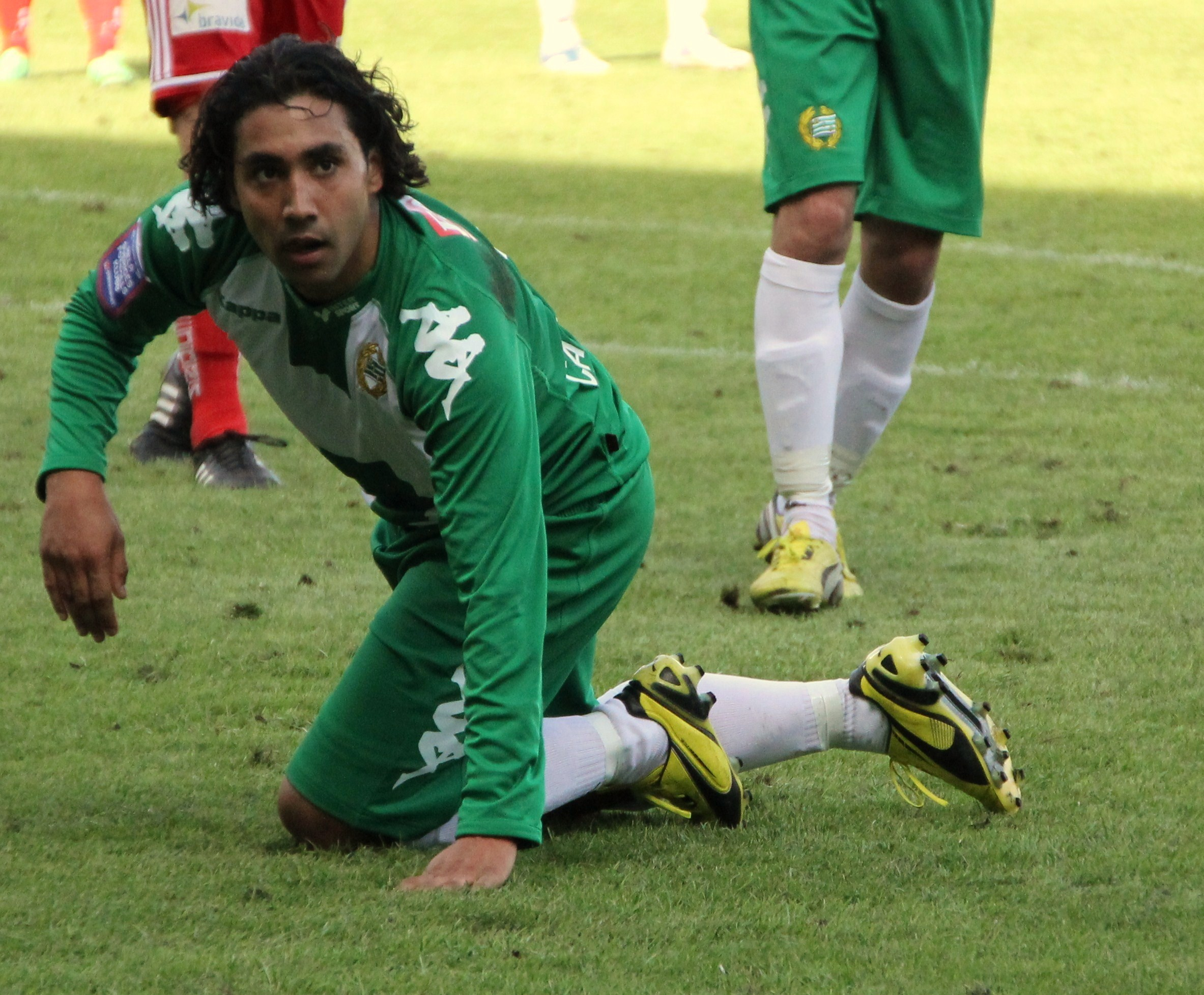 Hammarbys Sebastian Castro-Tello.